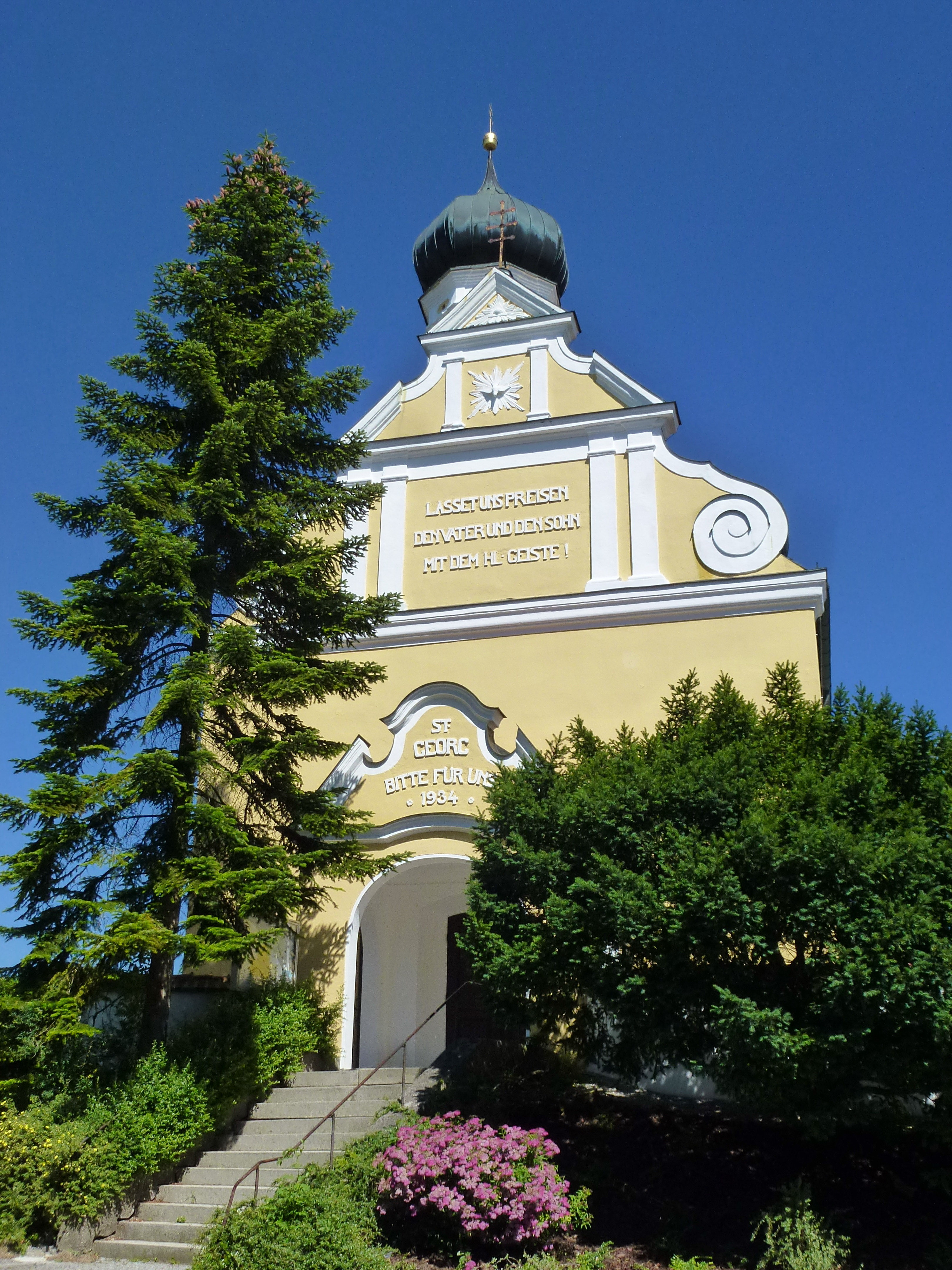 Aufkirchen, Nähe Münchner Straße: Katholische Pfarrkirche St. Georg. Ansicht von Westen